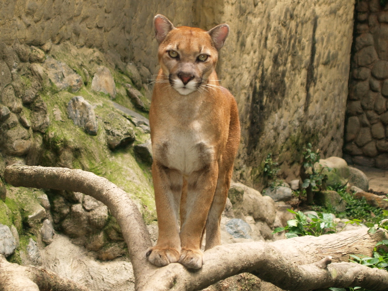 Los pumas son felinos que pueden apreciarse en el Parque Zoológico Santa Fe.